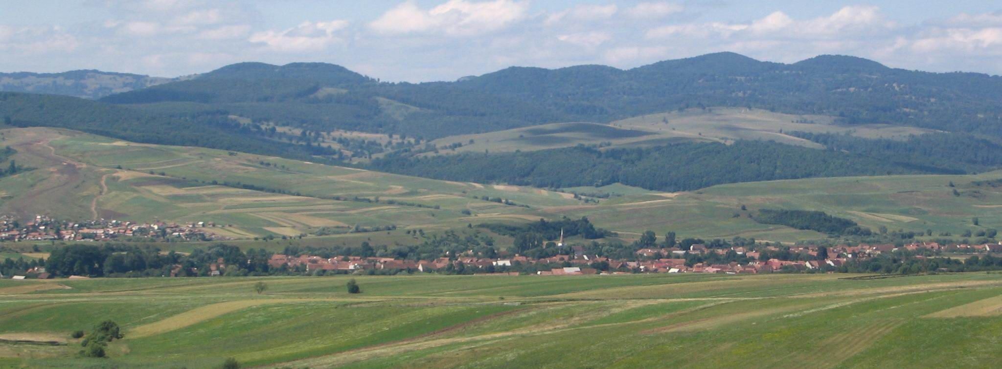 Bardoc - Bradut